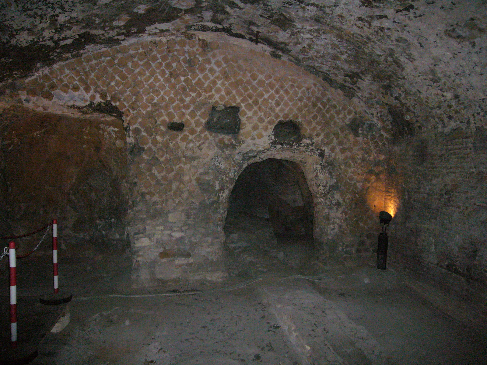 Roma, insula dell'Ara Coeli: interno dell'antico 2^ piano. Il muro di fondo è appoggiato direttamente sul tufo del colle capitolino